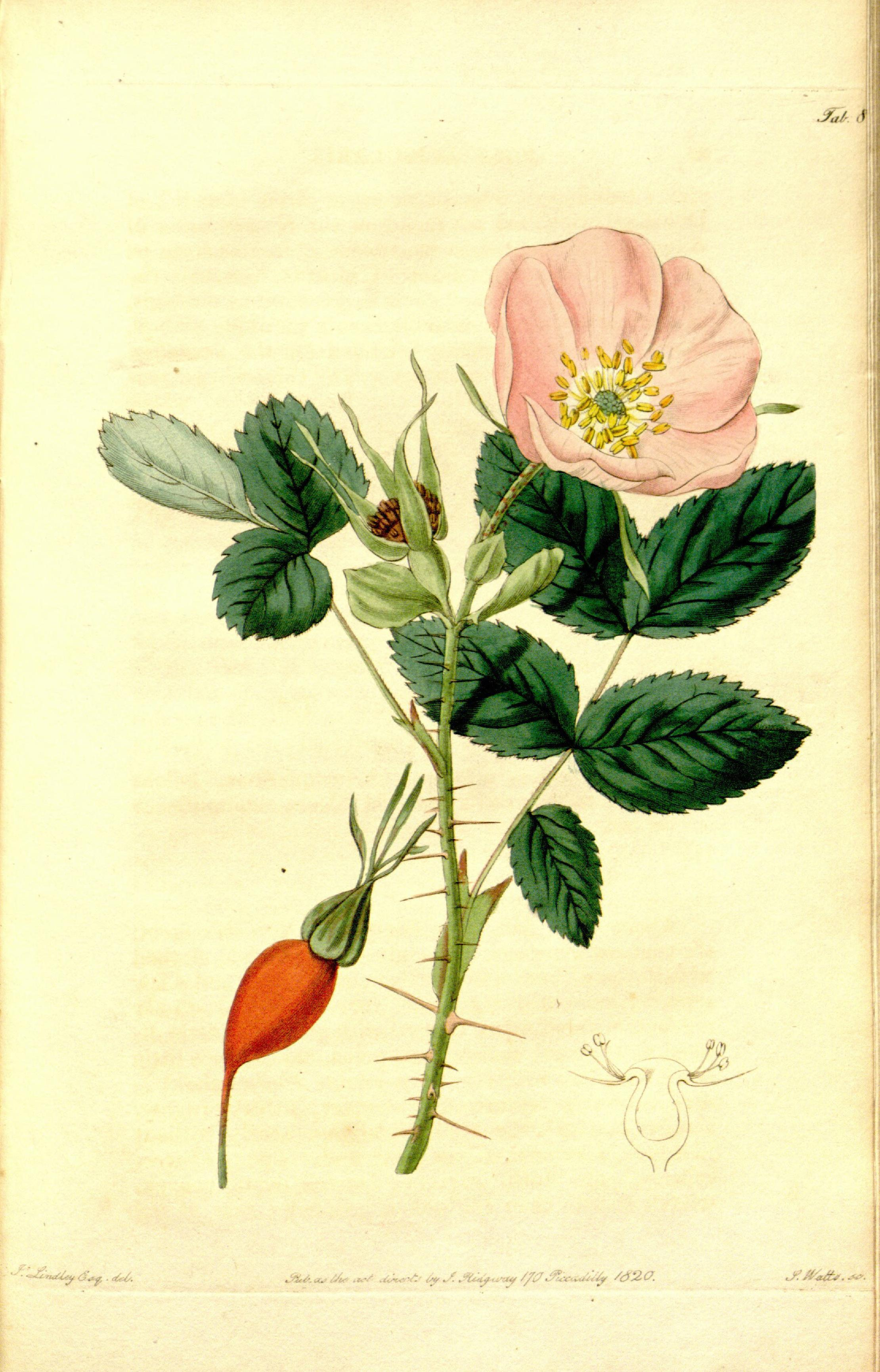 Шиповник иглистыйLatina: Rosa acicularis